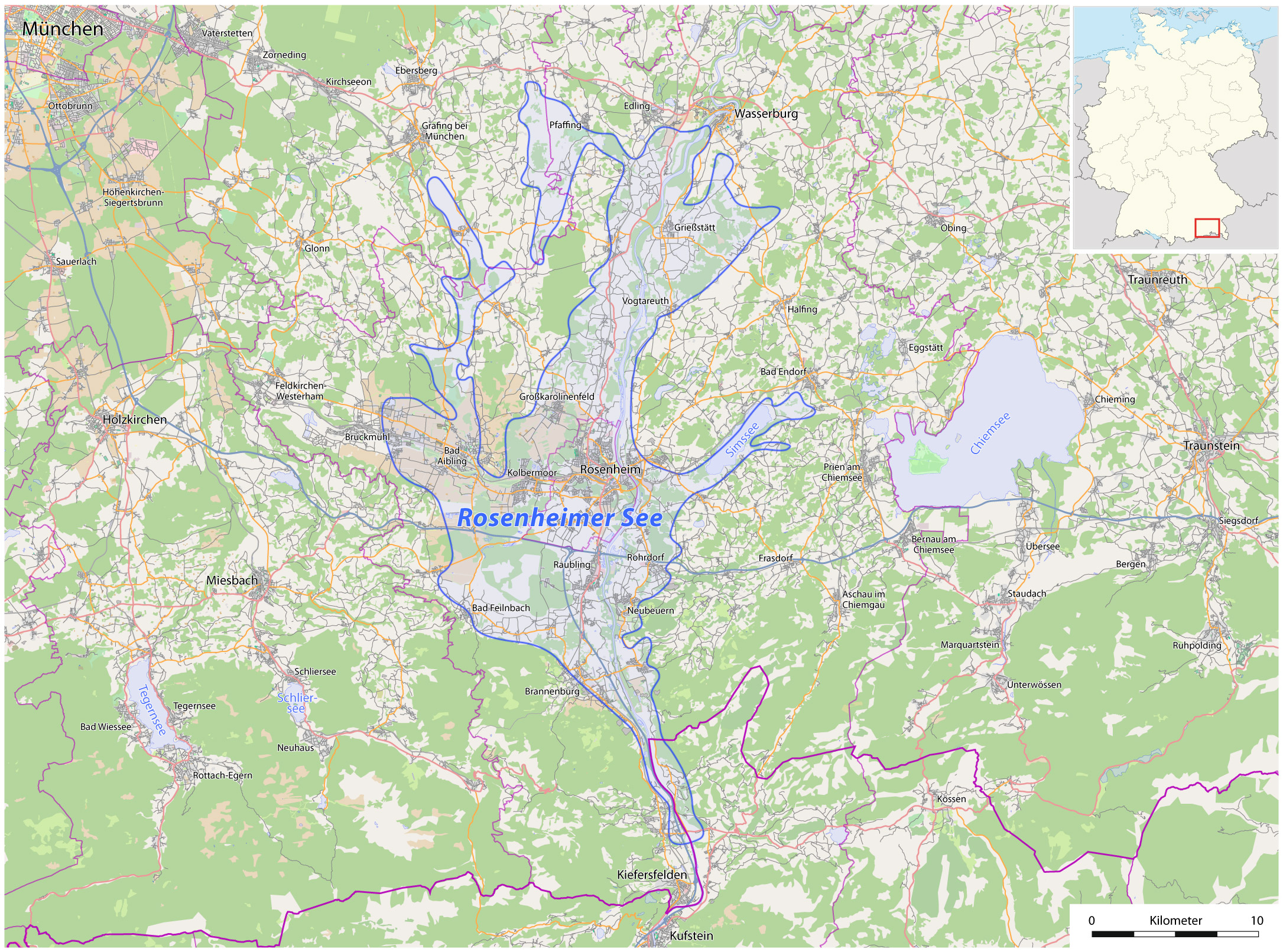 Lage des ehemaligen Rosenheimer Sees